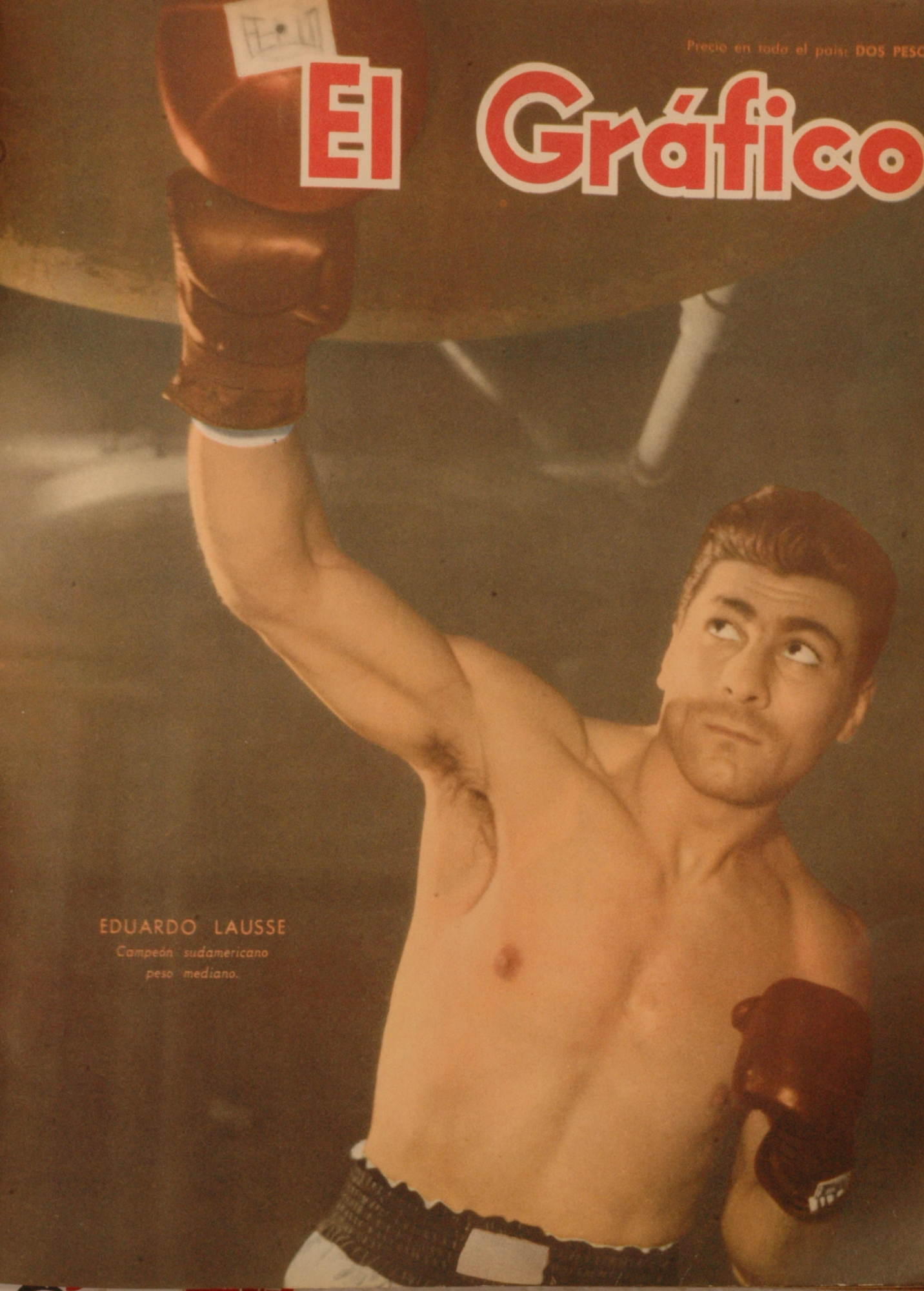 El Grafico del 29 de Junio de 1956. Edicion 1923